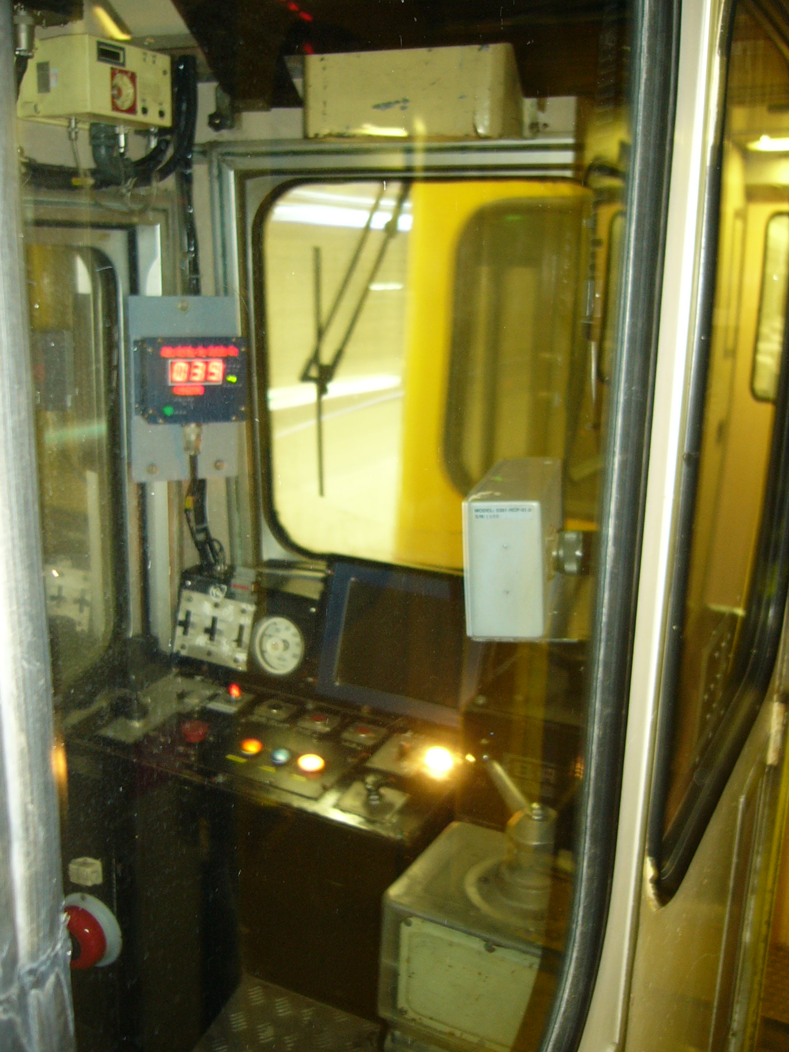 中文（台灣）: 台鐵EMU300型電聯車左駕駛室。